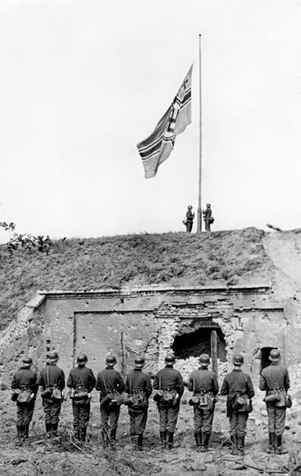 Westerplatte, Hissen der Reichskriegsflagge Zentralbild II. Weltkrieg 1939-45 Polenfeldzug, September 1939. Nach der Eroberung der Westplatte, dem Munitionsdepot der Polen im Norden von Danzig, am 8.9.1939 durch die faschistische deutsche Wehrmacht, wird die Reichskriegsflagge gehißt. [Danzig, Westerplatte.- Angetretene Soldaten vor wehender Reichskriegsflagge]